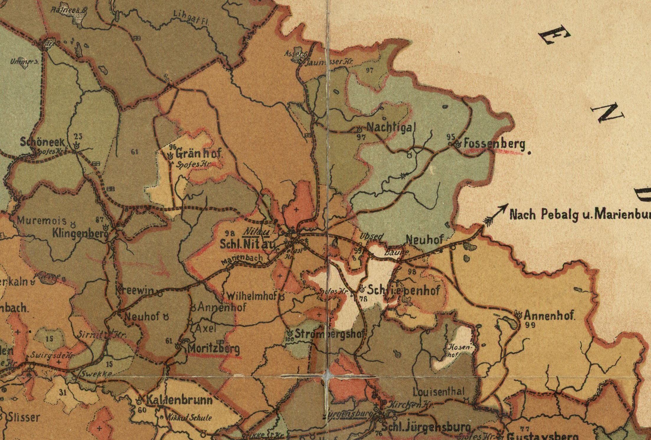 Nītaure kihelkonna mõisad 1905. aasta kaardil